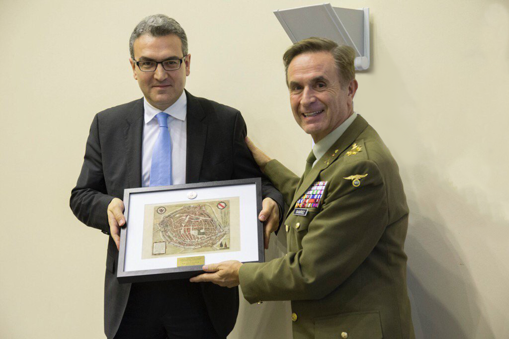 Eurocorps